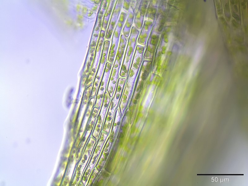 Einseitswendiges Kleingabelzahnmoos Dicranella heteromalla, Laminazellen, 400x